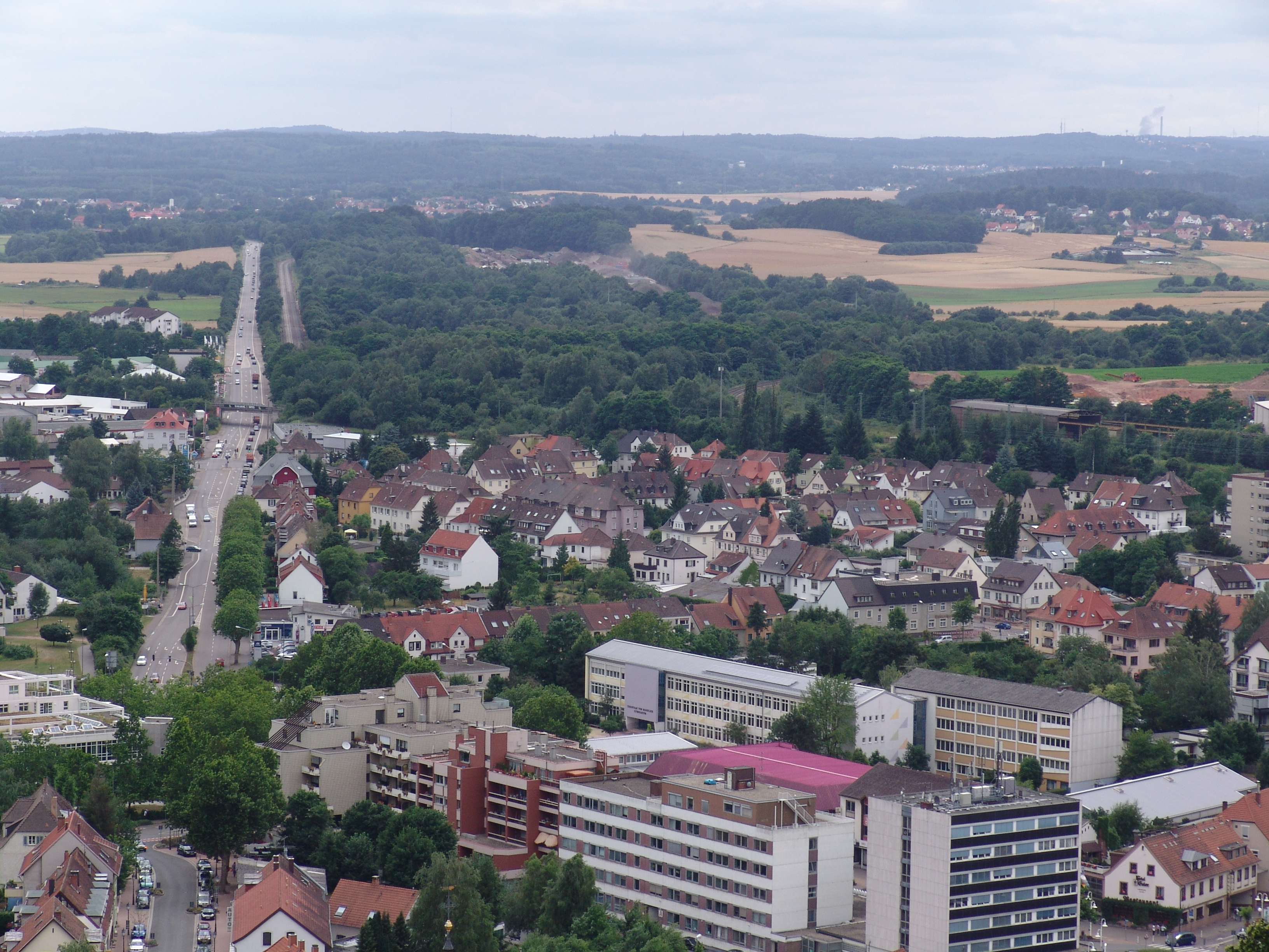 Universitätsstadt Homburg (Saar)